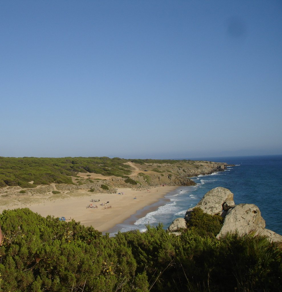 Playa del Cañuelo desde Faro Camarinal, dirección Tarifa. Andalucía, España